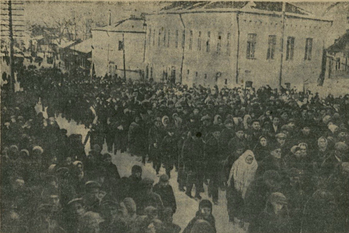 Пахаванне мастака Юдэля Пэна.